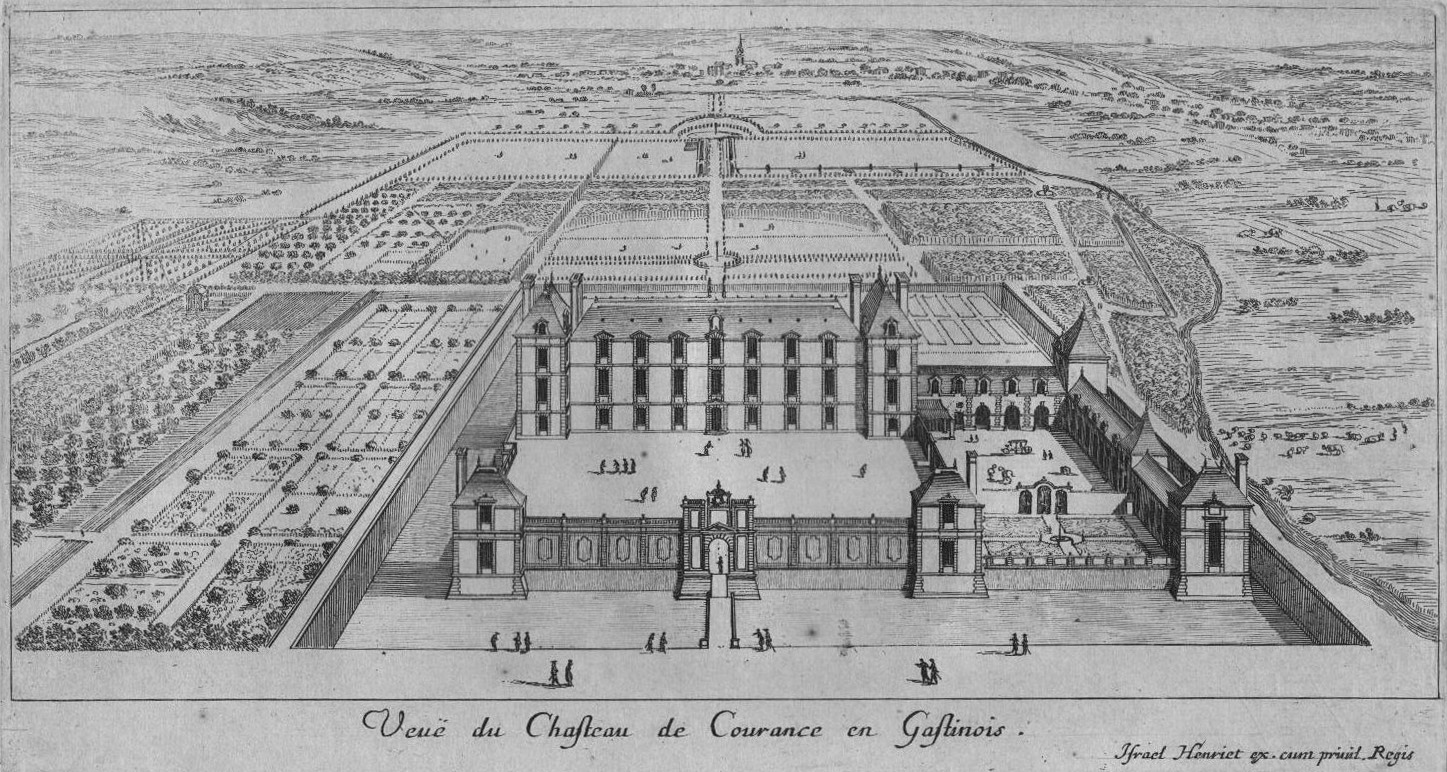 Stich mit der Abbildung des Schlosses Courances im 17. Jahrhundert